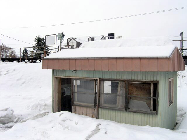 駅舎。 撮影場所 稲士別駅駅前道路より